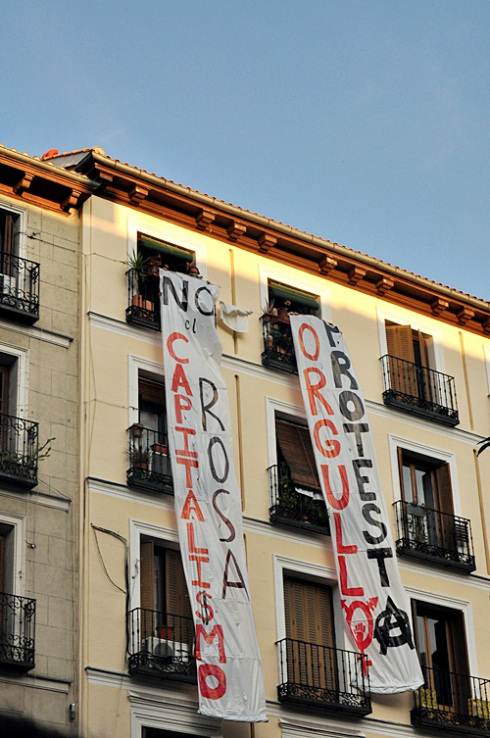 Despliegue de pancartas durante el pregón de las fiestas del Orgullo LGBTI 2013 en la plaza de Chueca (Madrid). "No al capitalismo rosa", "Orgullo es protesta".